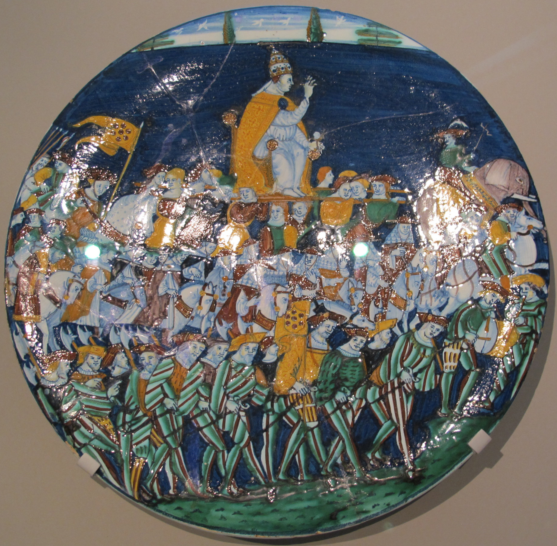 Montelupo, piatto con Leone X in processione a firenze, 1516 ca